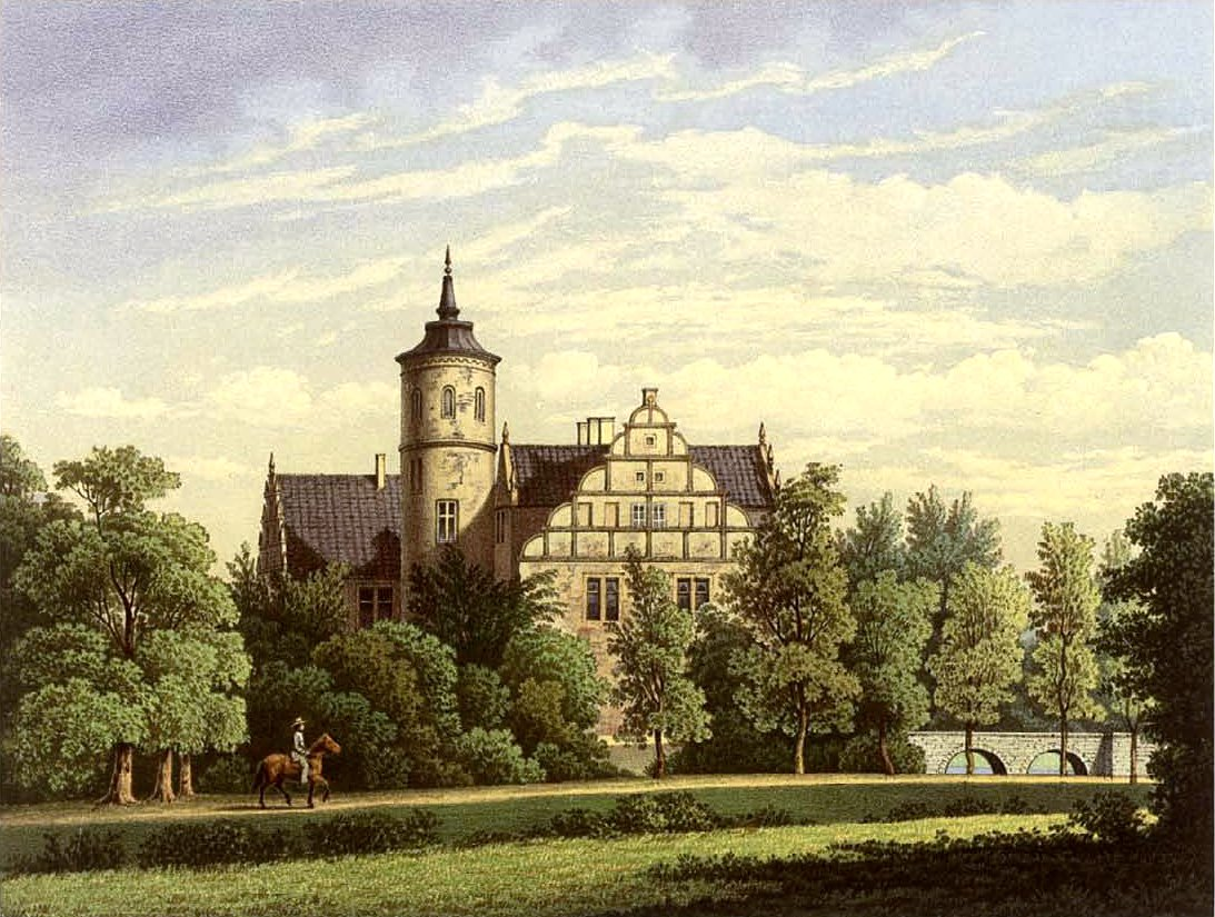 Schloss Ulenburg, Kreis Herford, Lithografie aus dem 19. Jahrhundert